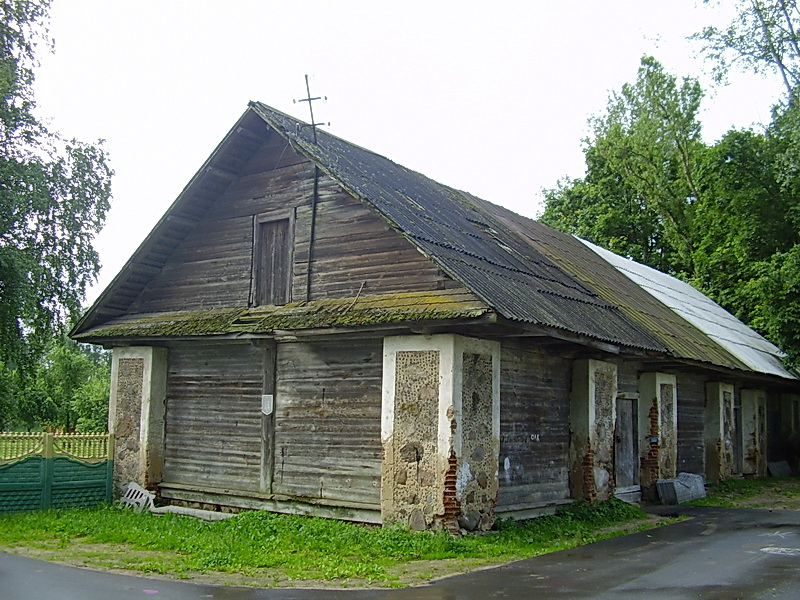 Калінаўка 2. Фрагменты былой сядзібы «Атонава» This is a photo of Belarusian heritage monument. Reference number: 613Г000176 ( WLM)